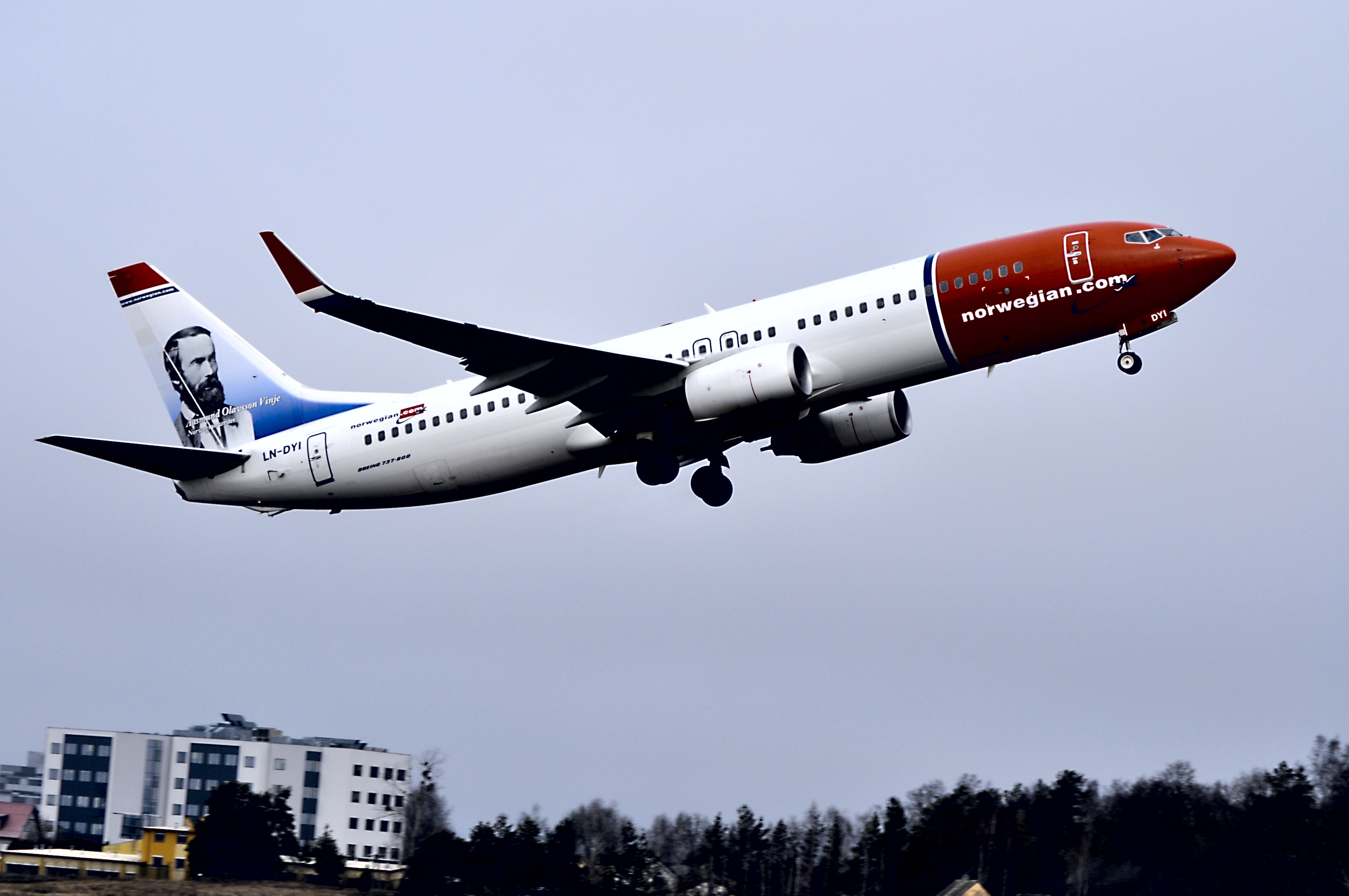 Gdańsk, Poland